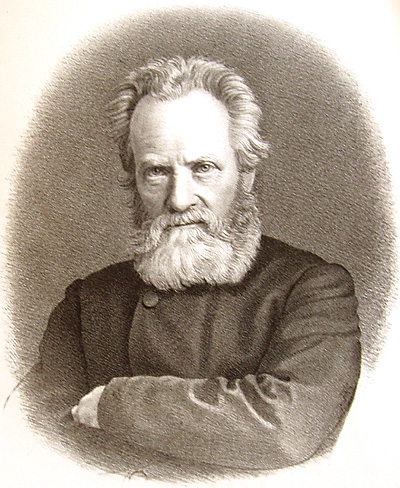 Herman Wilhelm Bissen (13.10.1798-01.03.1868)